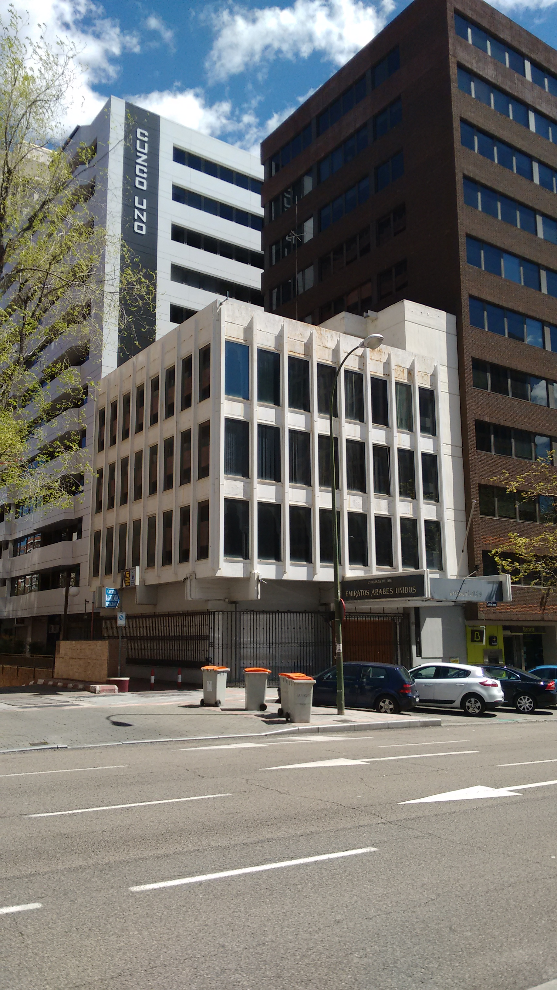 Embajada de los Emiratos Árabes Unidos, Madrid.